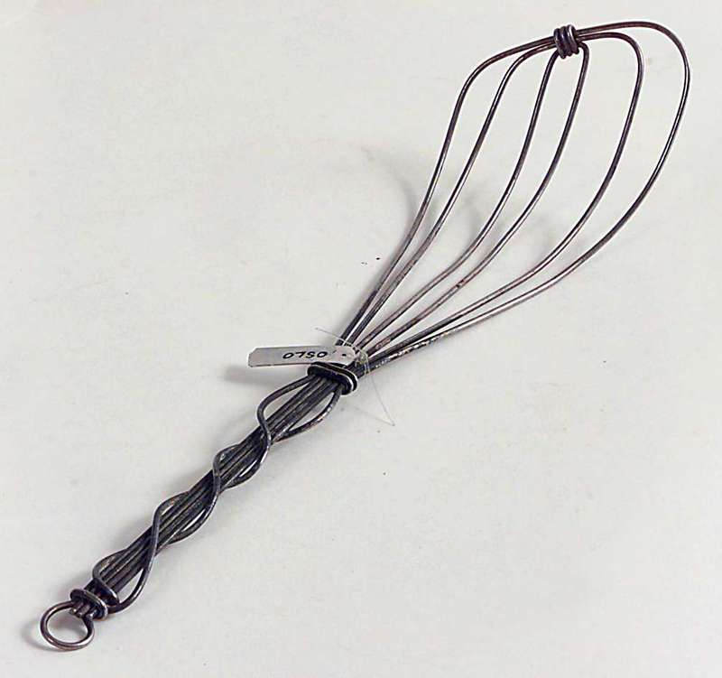 Visp laget av ståltråd omkring 1930. Lengde 27 cm. Norsk Folkemuseum, NF.1982-1074.